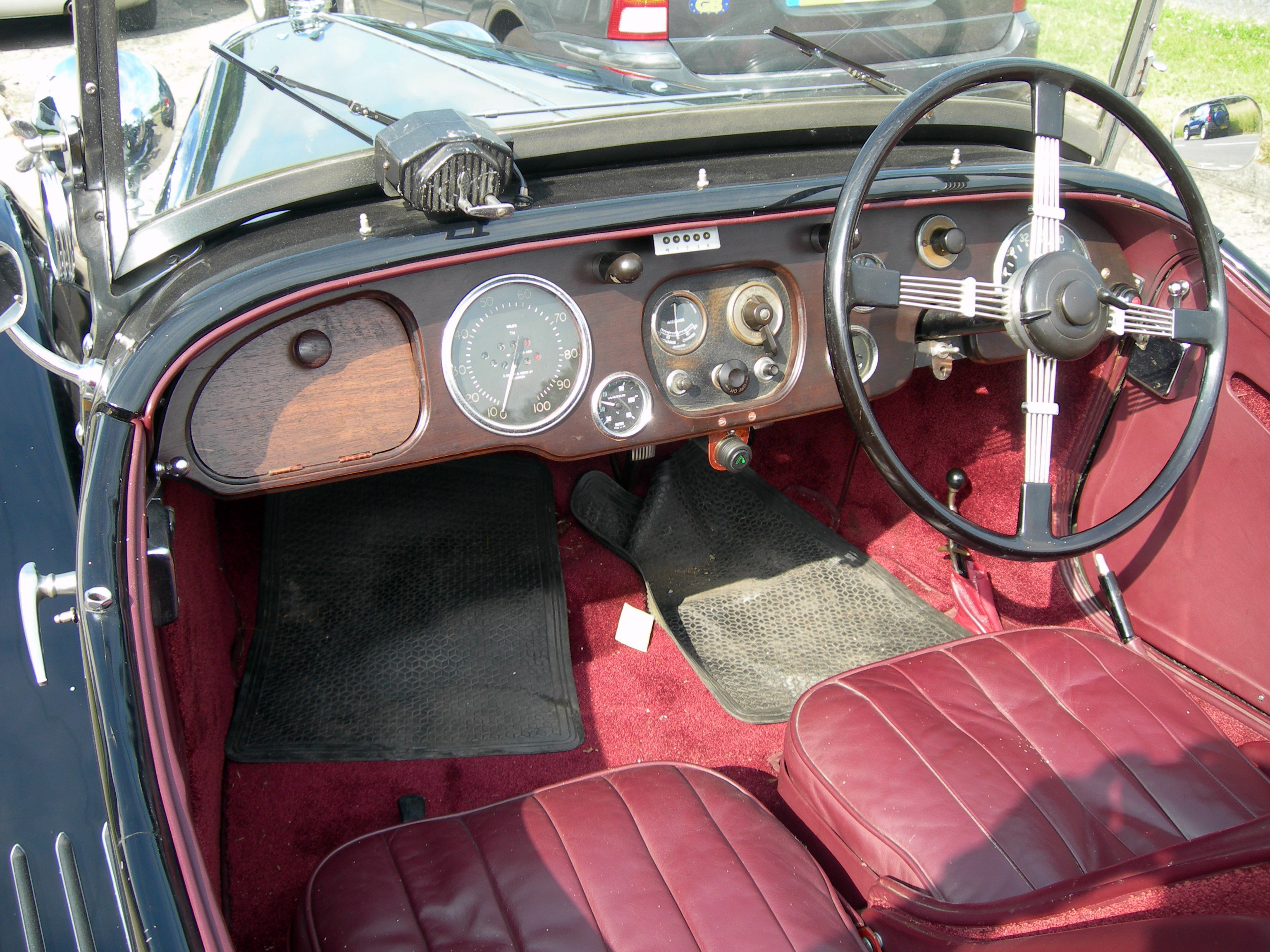 Reigate,June 2009